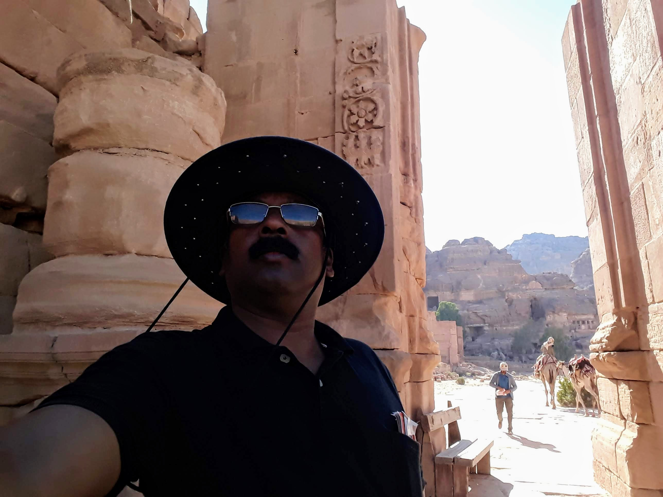 ഭൂകമ്പത്തിൽ തകർന്ന ട്രിപ്പിൾ കമാനങ്ങളുള്ള ടെമെനോസ് ഗേറ്റ്‌വേ ക്കു മുന്നിൽ !